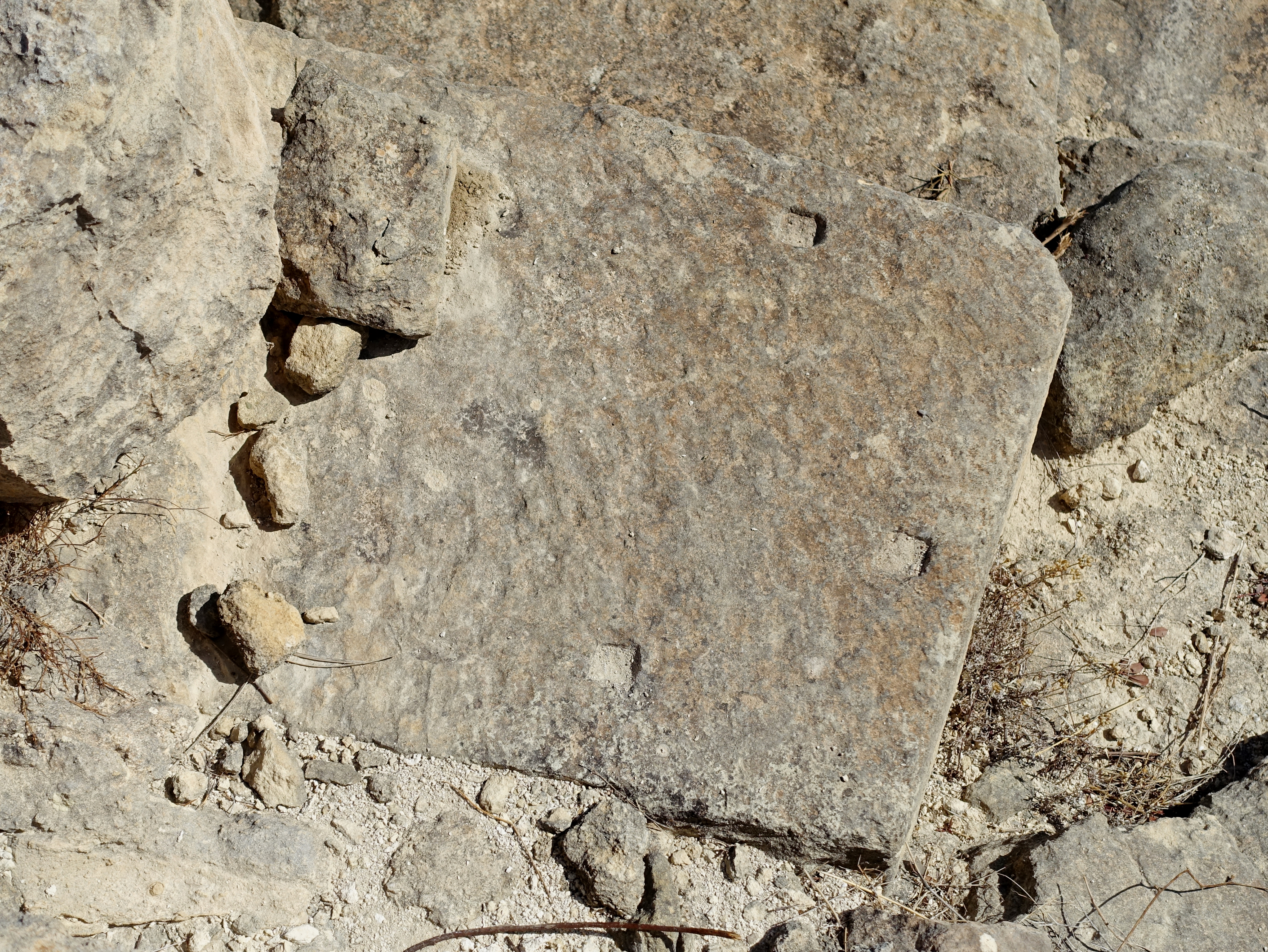 Minoische Villa von Zou (Ζου), Gemeinde Sitia, Kreta, Griechenland